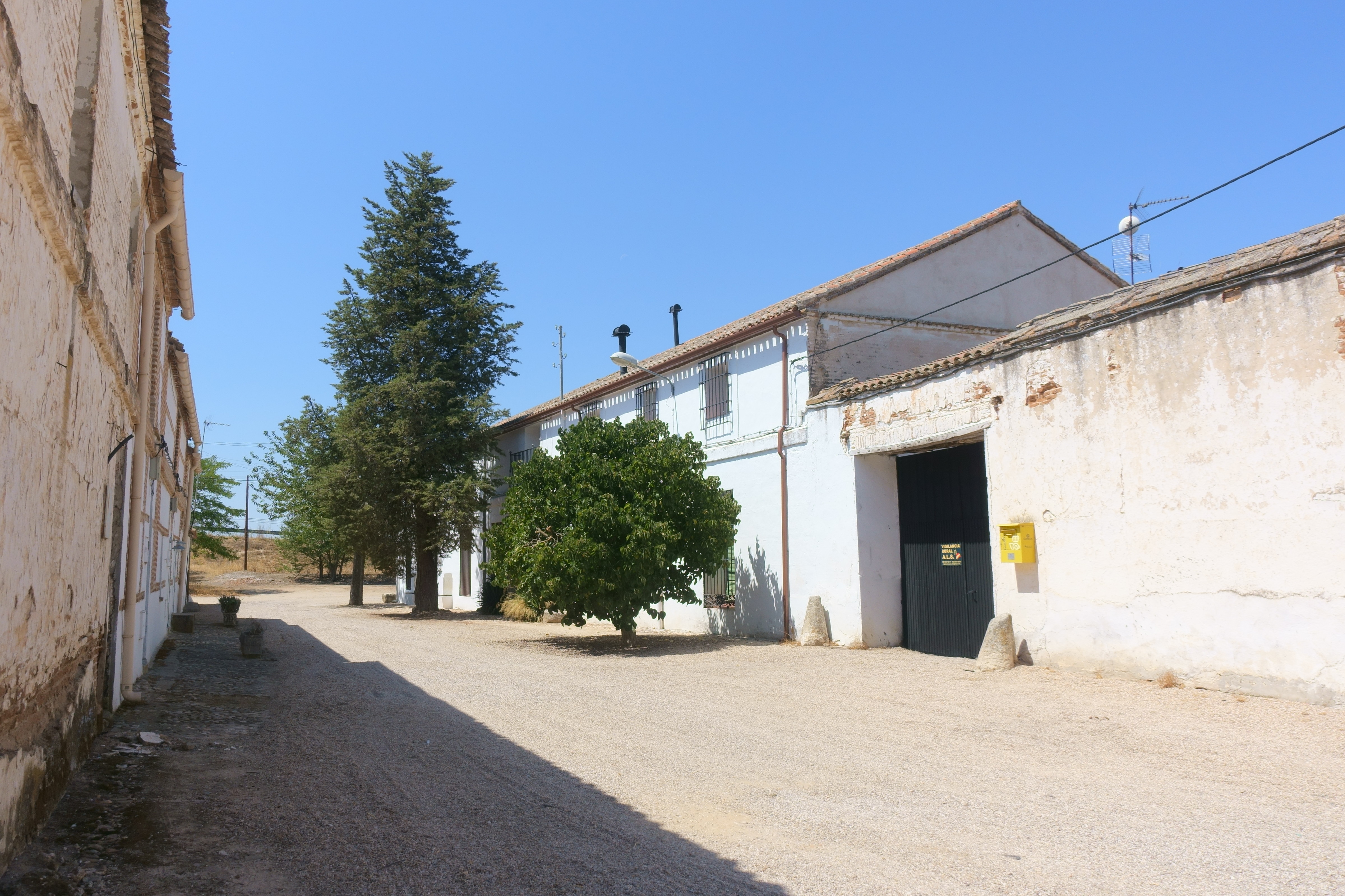 Calle en Illán de Vacas (Toledo, España).